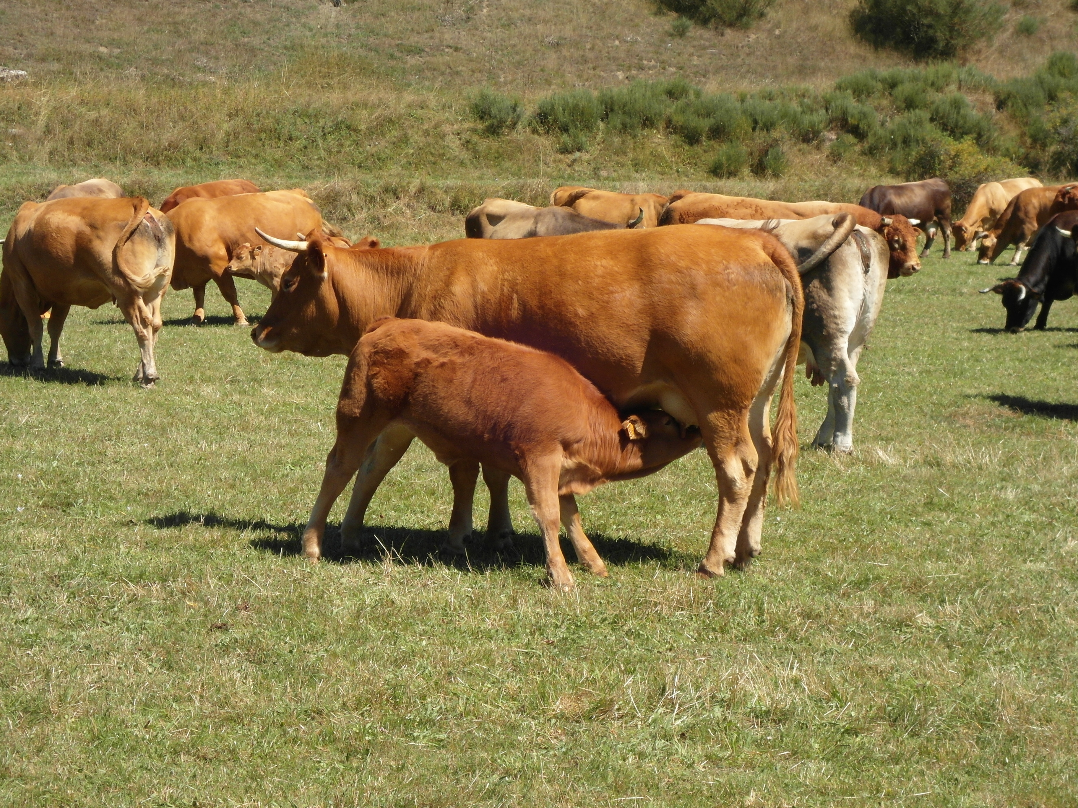 Vacas pastando